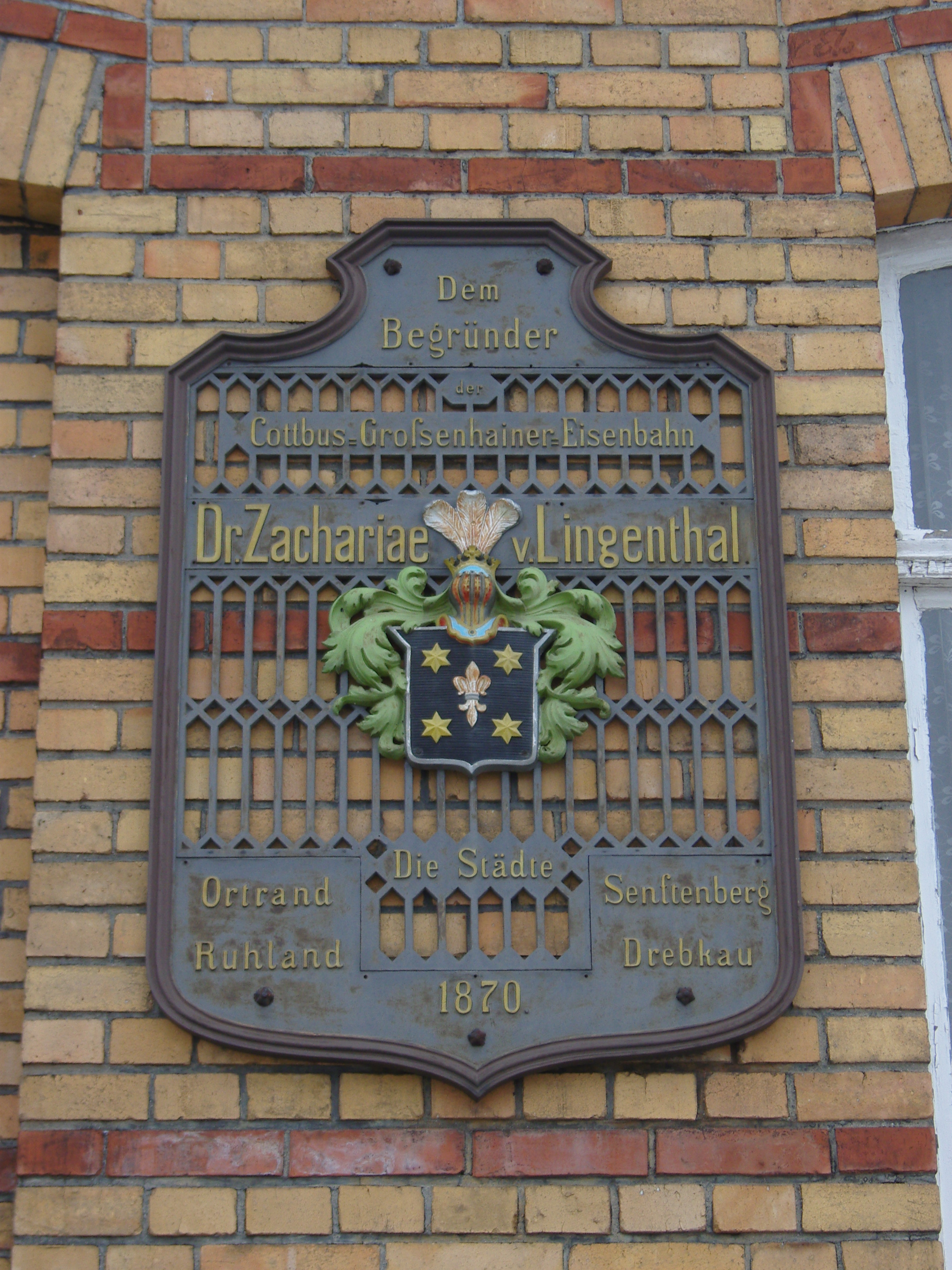 Gedenktafel am Bahnhof Ortrand für den Begründer der Cottbus-Großenhainer Eisenbahn - Zacharias von Lingenthal